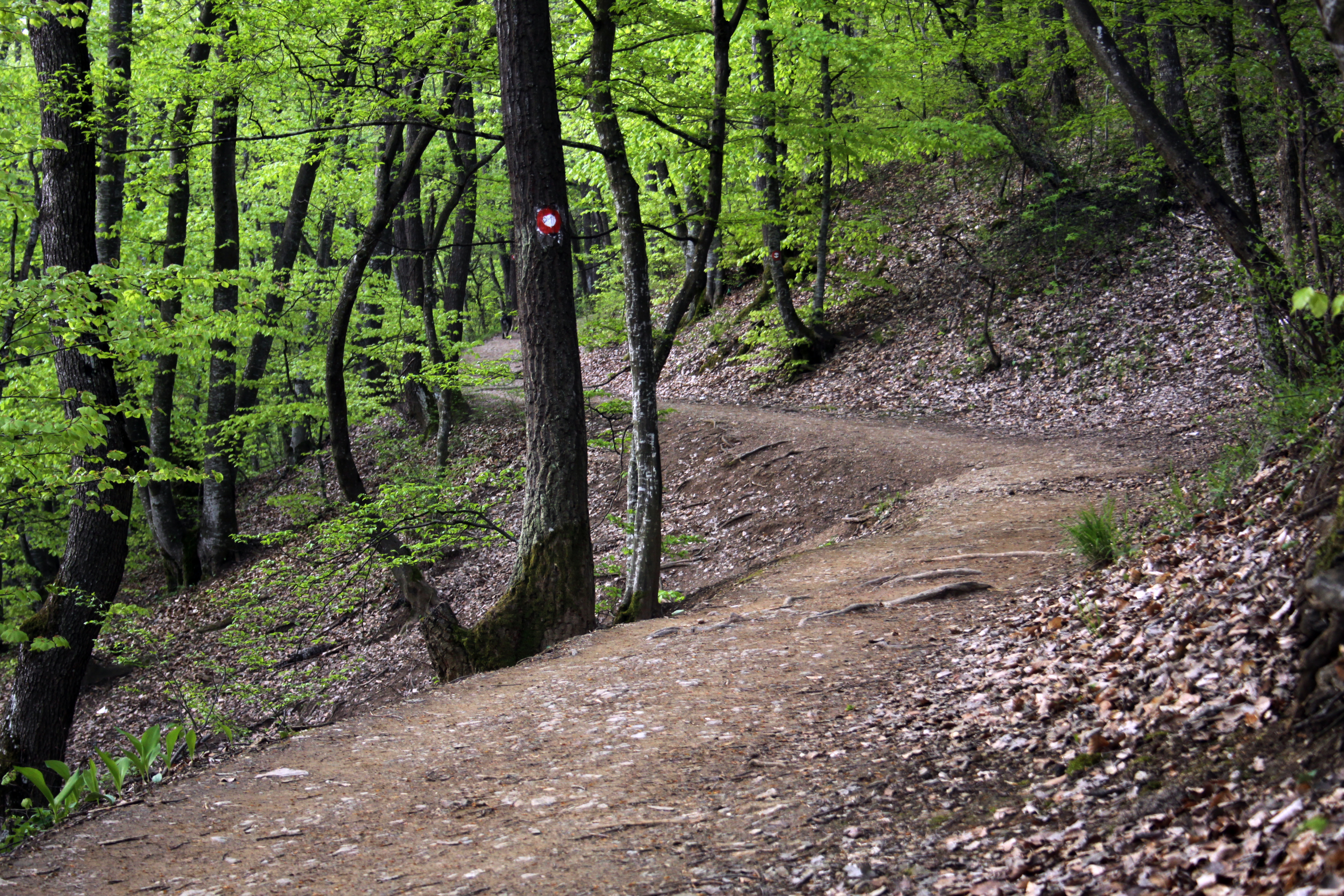 Gërmia, Prishtinë